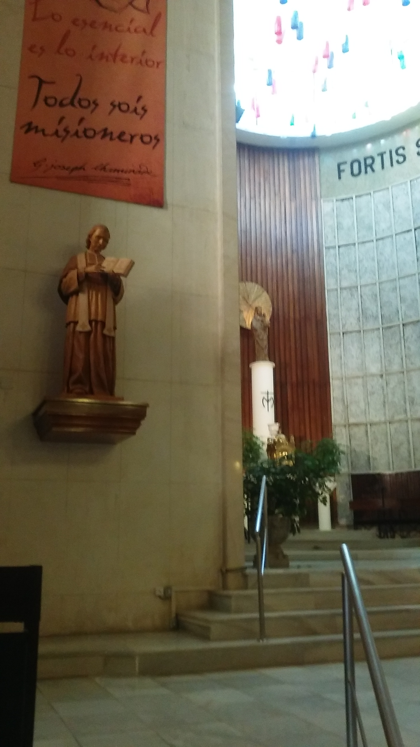 Parroquia de El Pilar en Jerez de la Frontera, con imagen de Guillermo José Chaminade